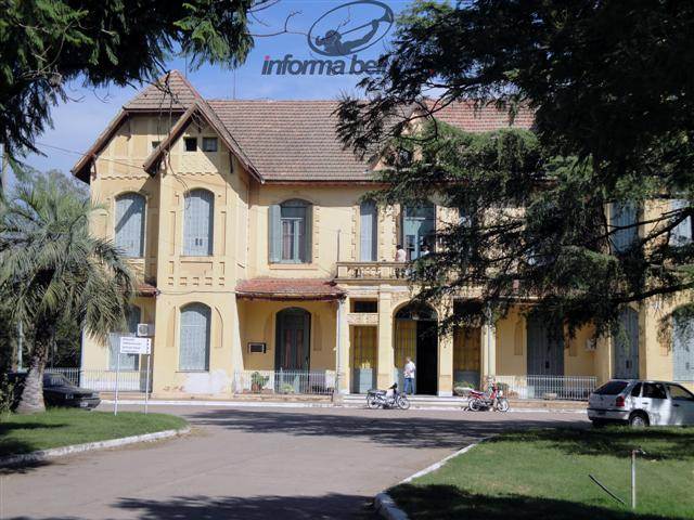 Hospital Primero de Bell Ville